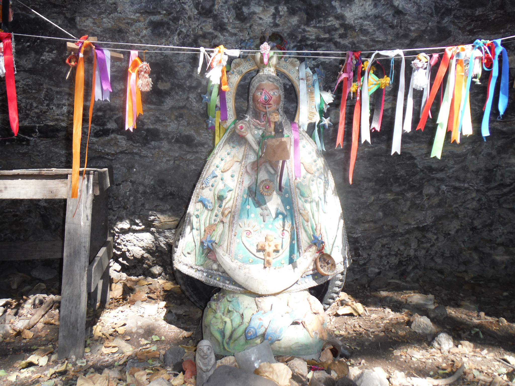 Escultura religiosa representando a la Virgen de San Juan de los Lagos.